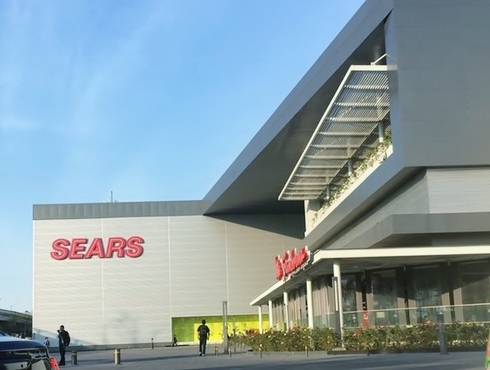 Sears Ciudad de Mexico